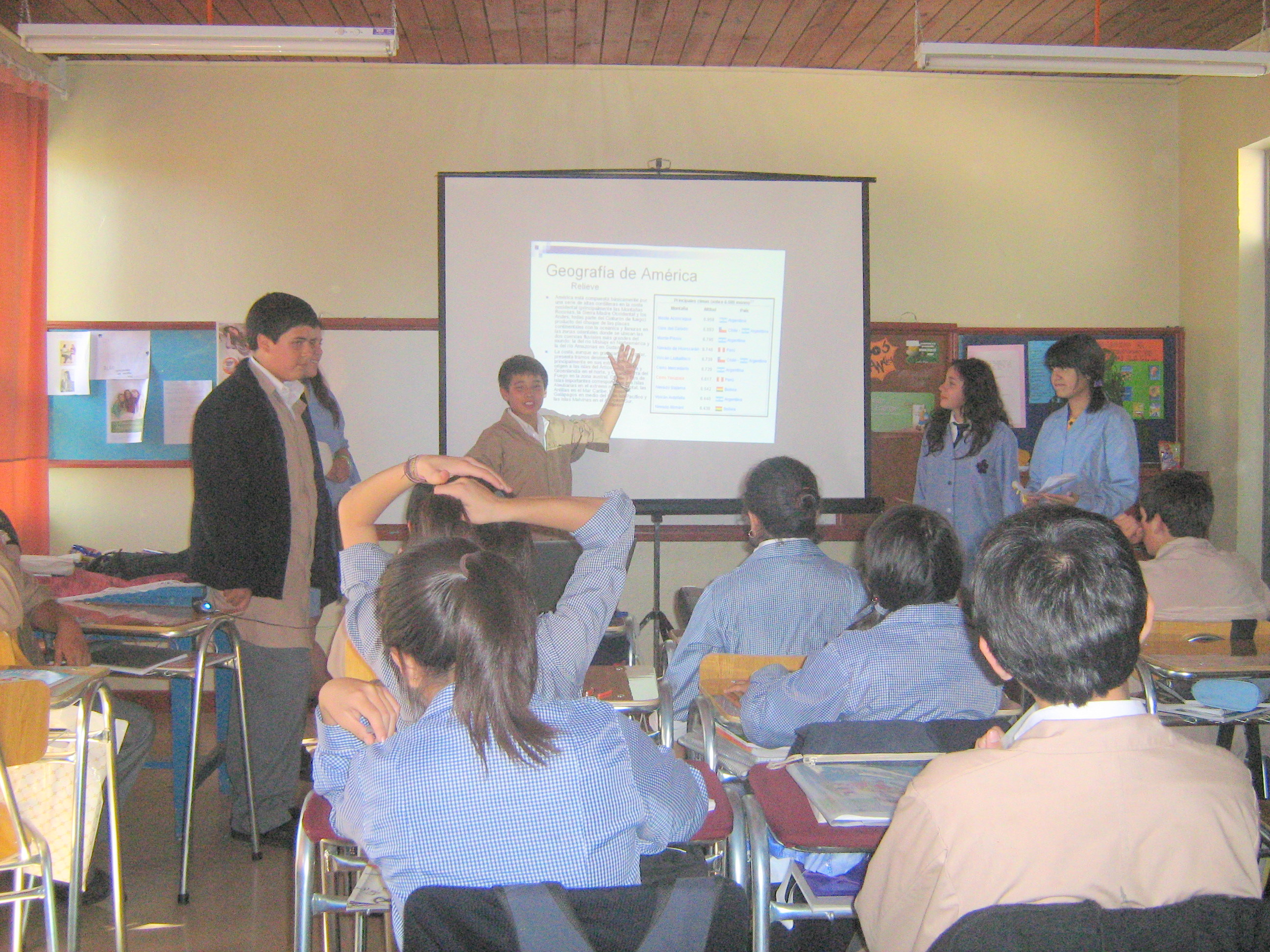 Un grupo disertando sobre América.